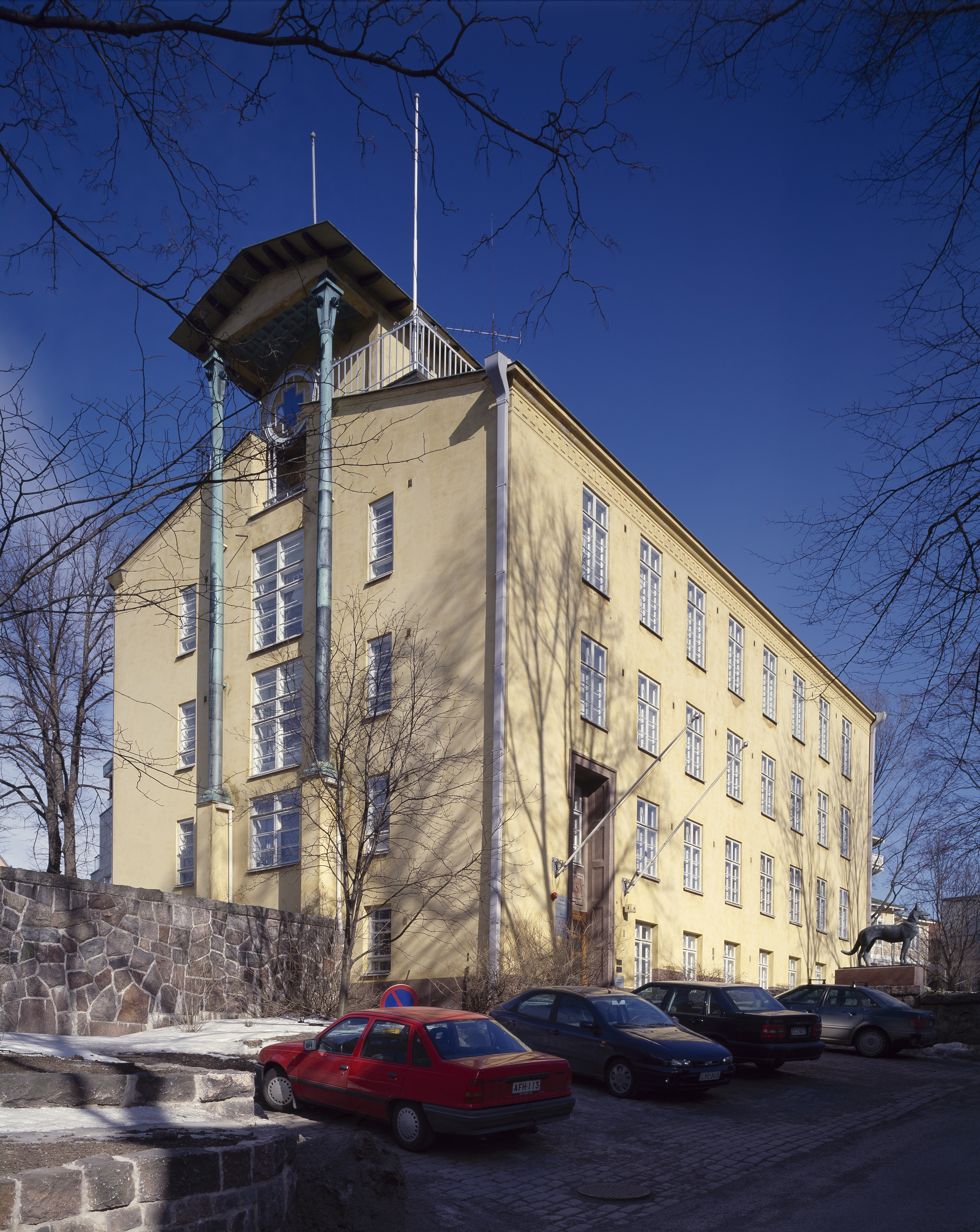 Kaivopuisto. Kalliolinnantie 4. Salus -sairaala, Wihurin tutkimuslaitos. -- dia, filmi, väri